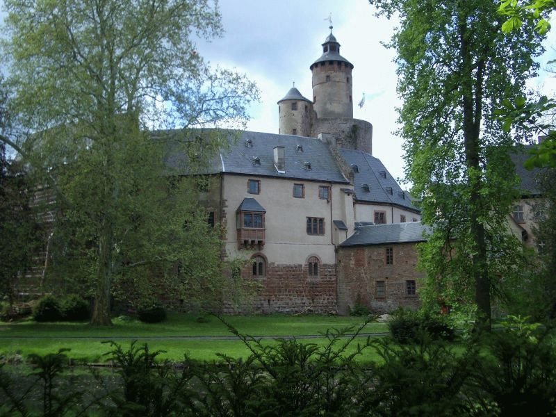 Das Schloss Büdingen vom Schlosspark aus.